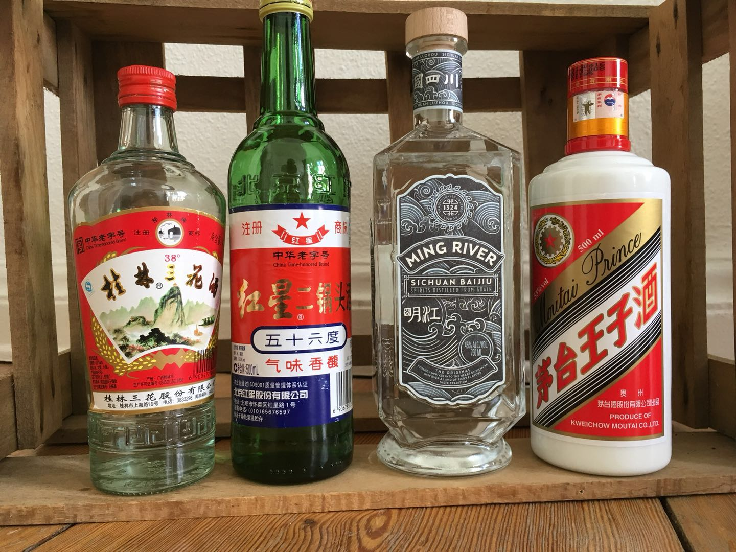 von links nach rechts: - Reisaroma: Guilin Sanhua - Leichtaroma: Hongxing Erguotou - Starkaroma: Ming River Sichuan Baijiu (Luzhou Laojiao) - Sossenaroma: Moutai Prince